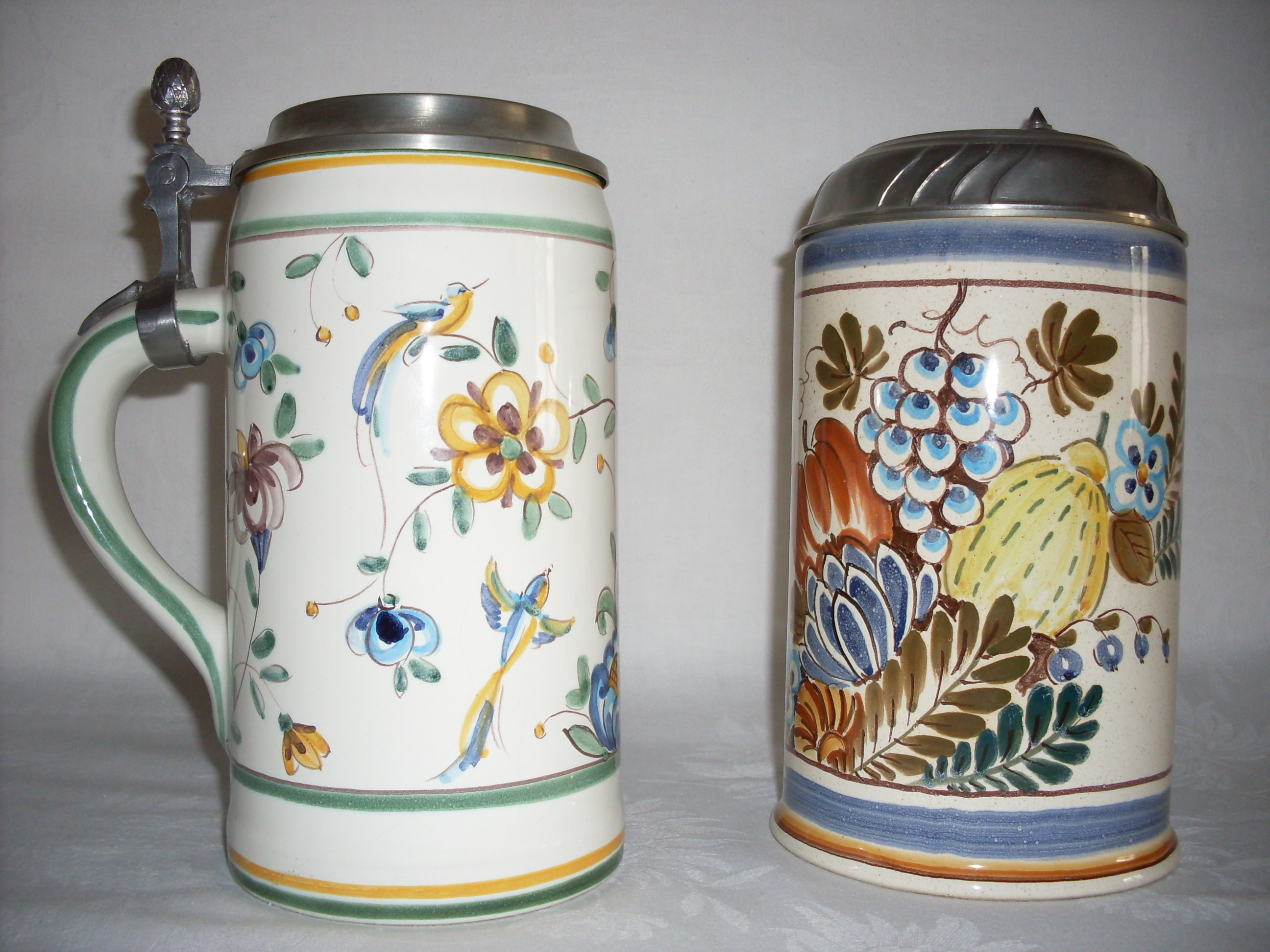 Fayence-Walzenkrüge mit Zinndeckel, handbemalt, mit Malerzeichen, Bierkrug 1 ltr, Dekor "Hanau", Art.Nr. 96730, Bierkrug 1ltr Dekor "Obst", Art.Nr. 96723; von Ulmer Keramik